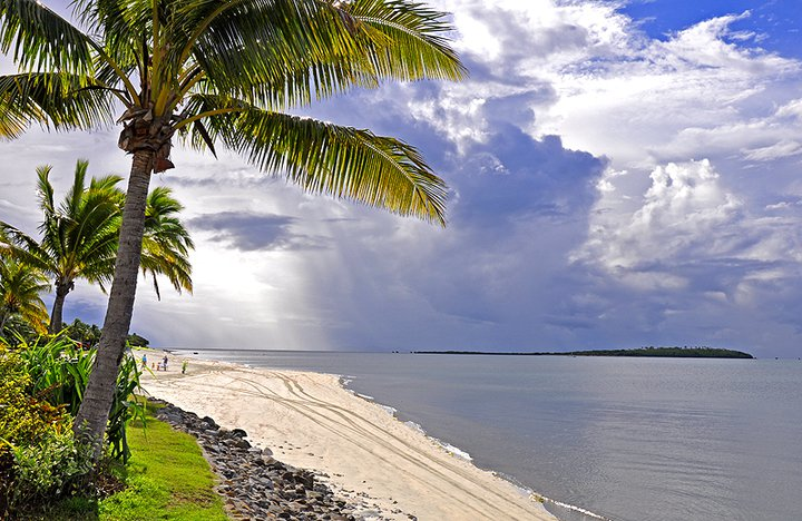 Denarau Island, Fiji